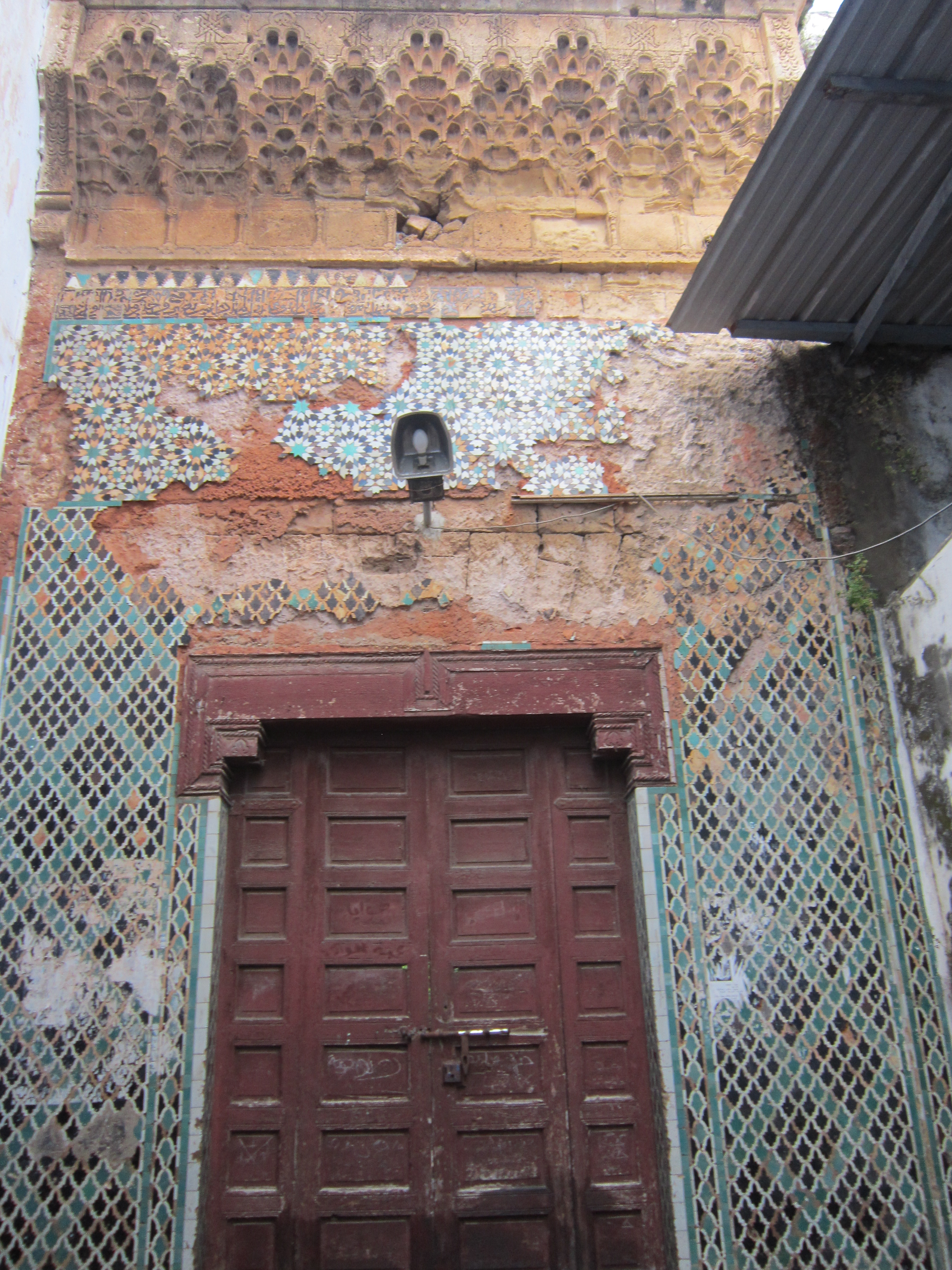 Façade maristane salé sur le rue de souk laghzel (de la soie) dans la médina de Salé. Maristane bâtit par le sultan mérinide Abou al hassan ben uthman en 1345